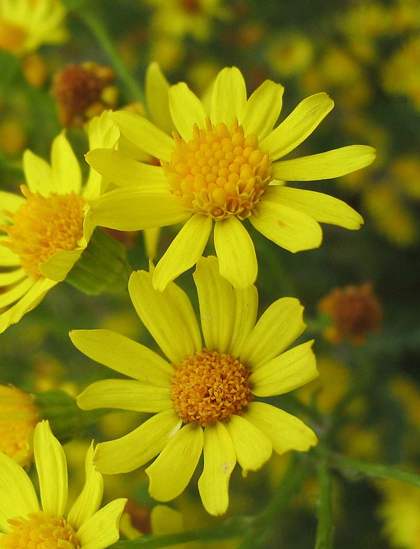 Senecio jacobaea (Séneçon jacobée) Photo prise à Meise en août 2005 Jean Tosti 2005